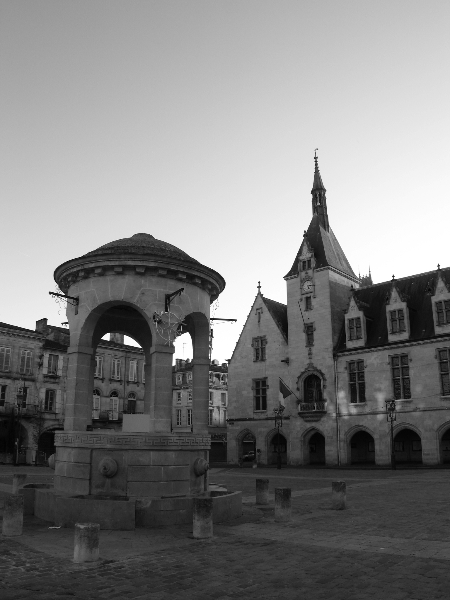 Libourne.Place.Mairie.jpg